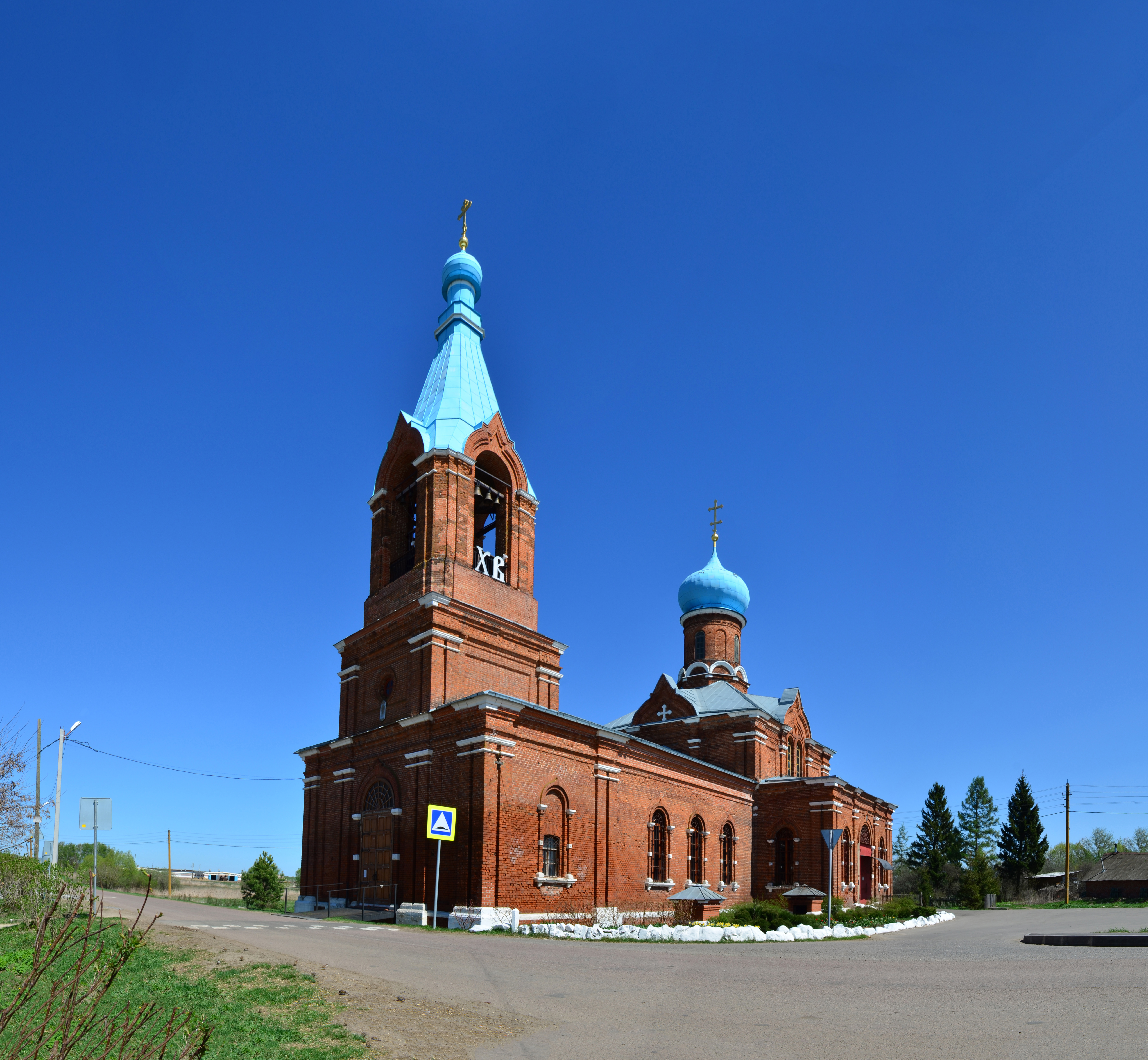 Успенская церковь в д.Рожново Зарайского р-на Московской обл.